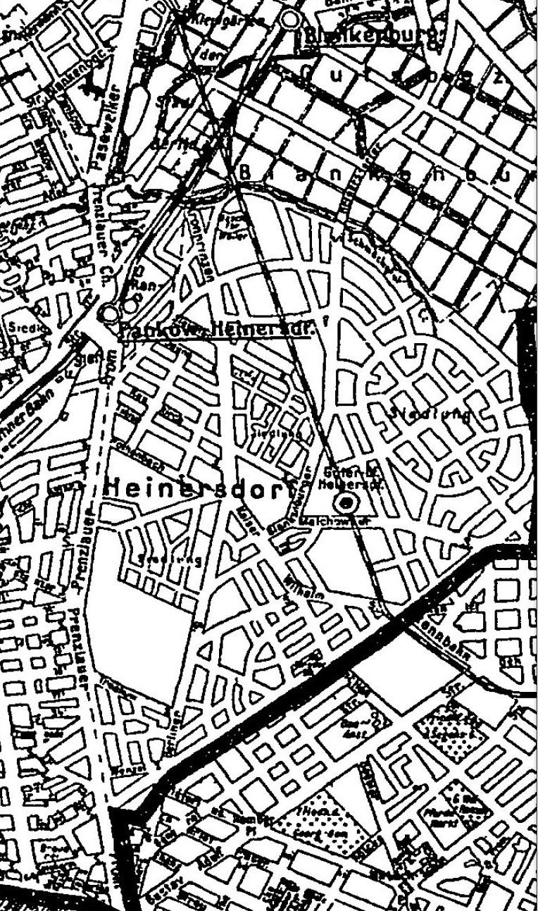 Die Straßensituation der Heinersdorfer Straßen (Ortsteil Heinersdorf im Berliner Verwaltungsbezirk Pankow) nach dem Silva-Plan, wie er als Vorlage für das Berliner Adressbuch 1923 genutzt wurde.